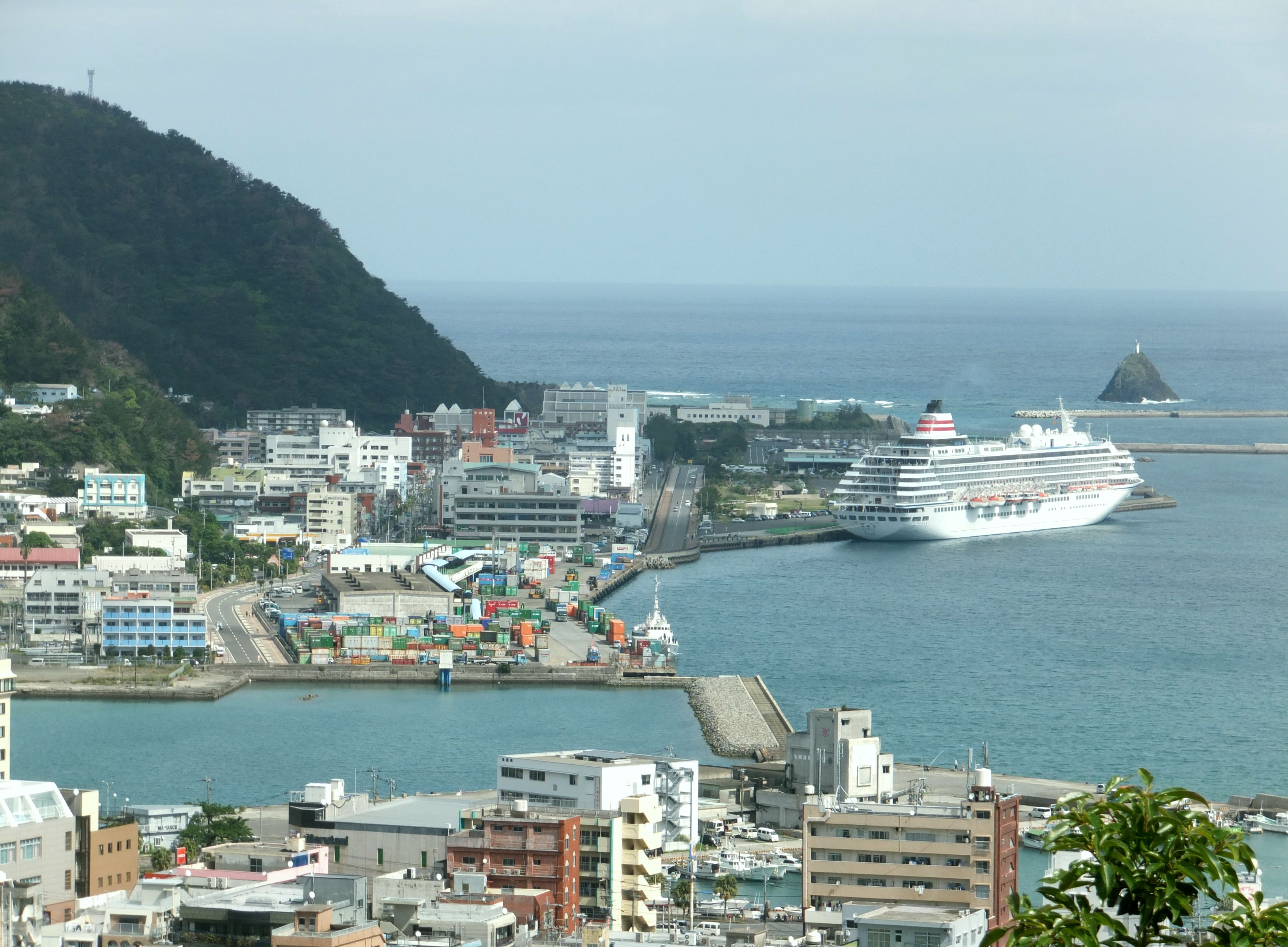 名瀬港 一番手前が本港地区、貨物が置かれている川の対岸が新港地区、船が停泊している所が長浜地区。